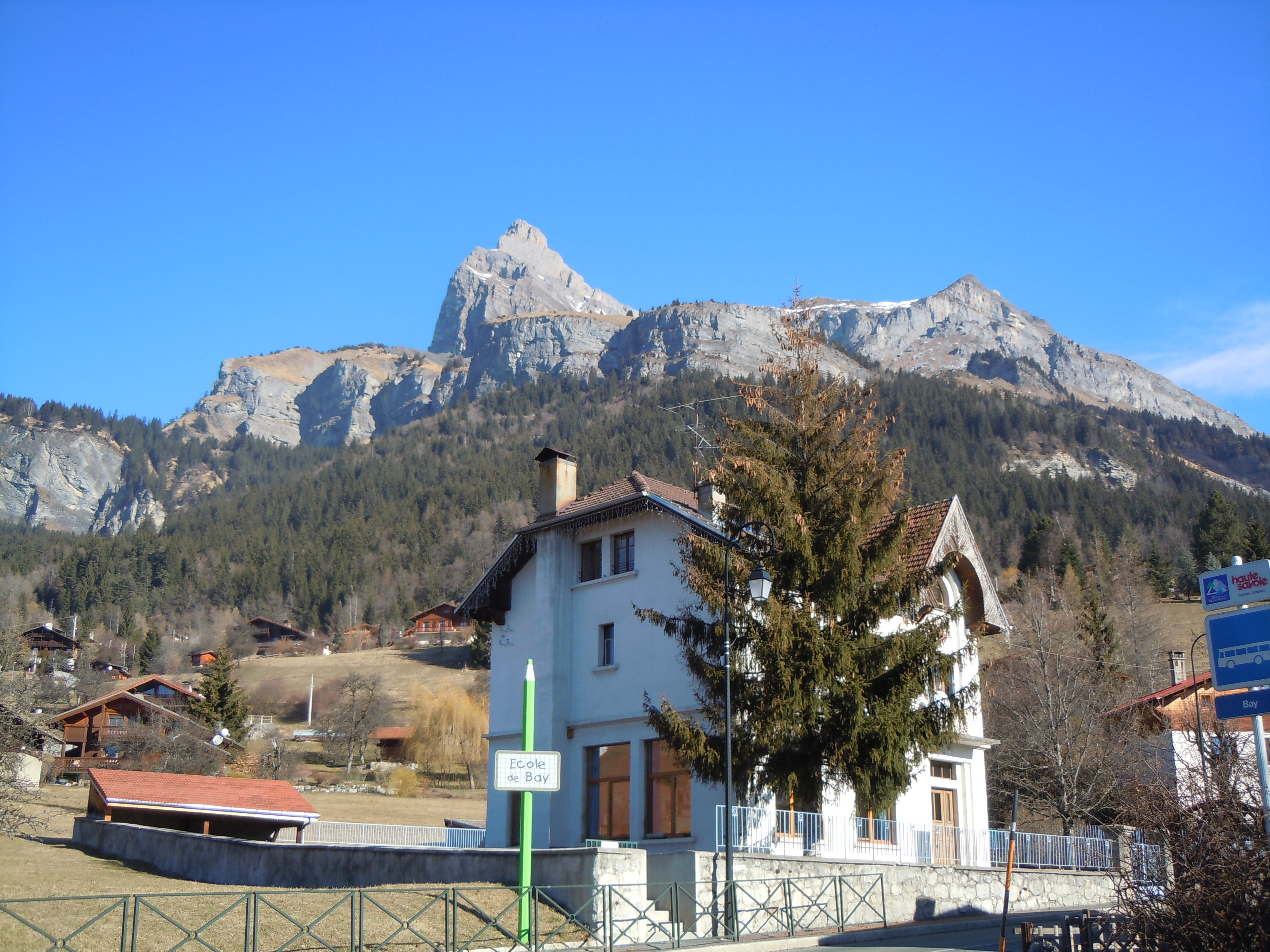 Ecole de Bay - Passy - Haute-Savoie - au pied de l'Aiguille de Varan